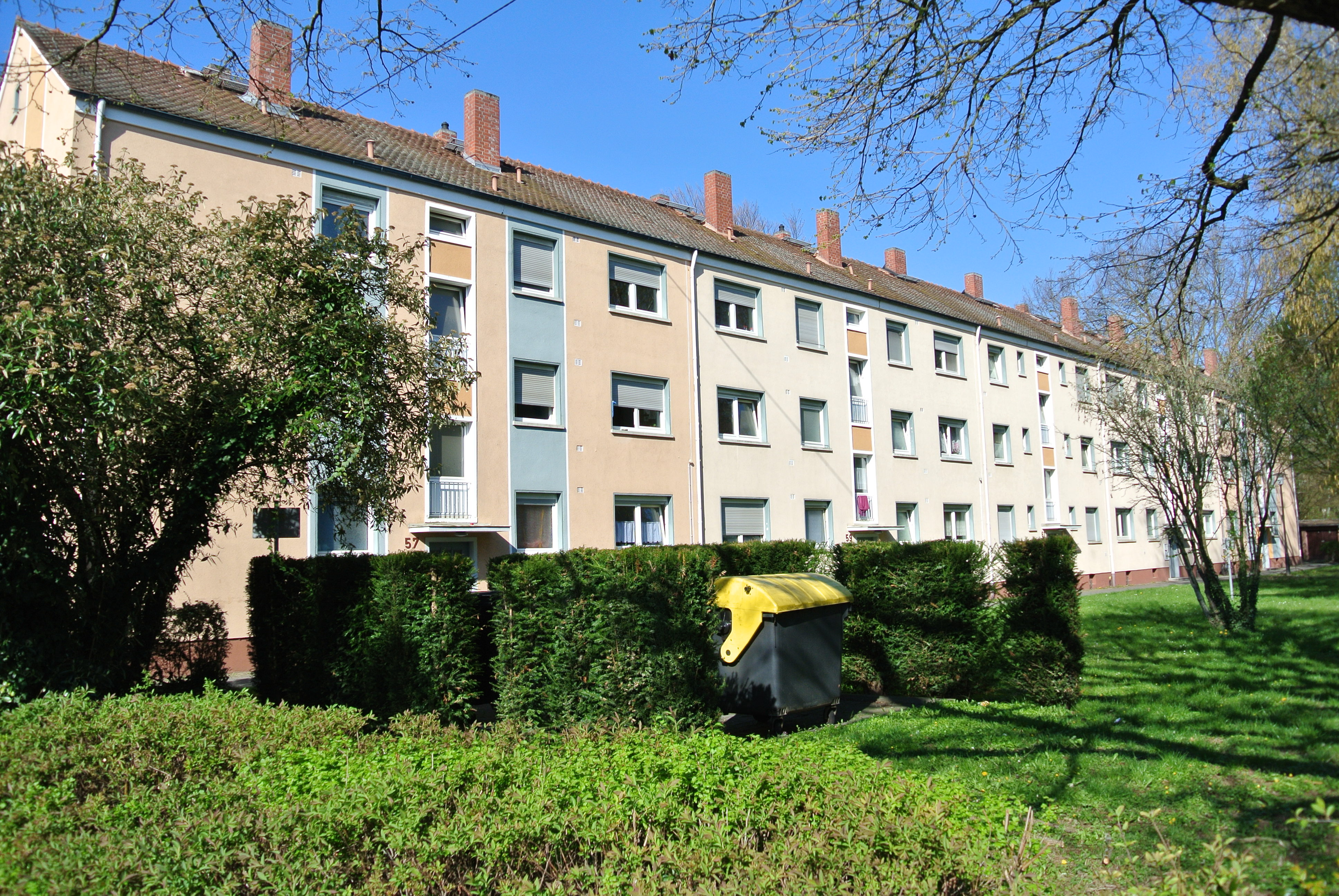 typische Gebäudezeile; Bauzeit der Siedlung: 1950-1962